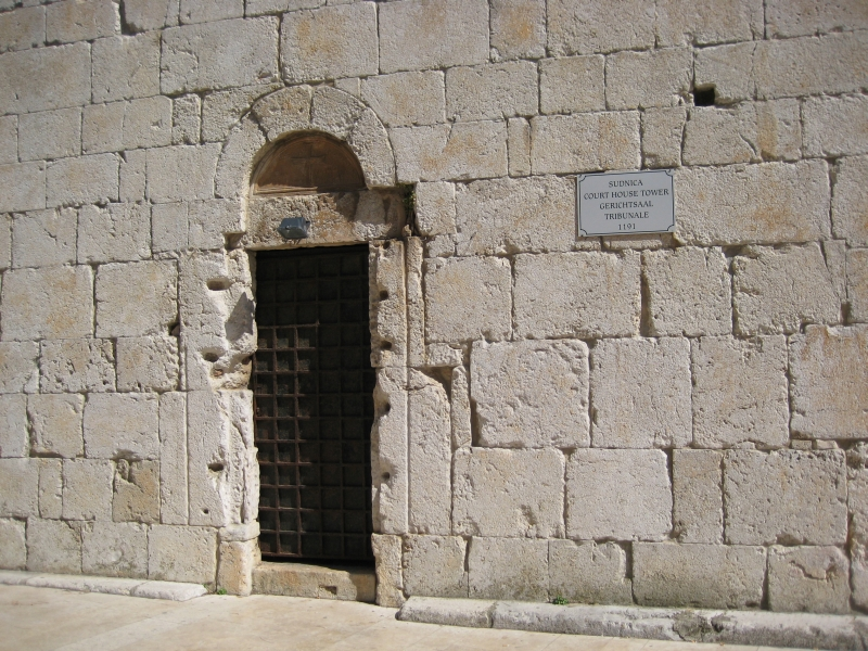 Sudnica (1191), Krk, Croatia